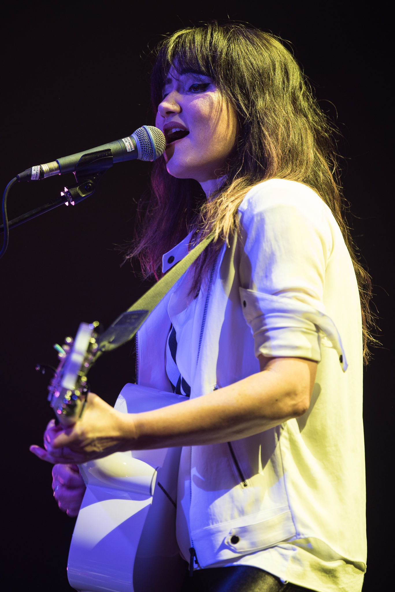 Concertbüro Franken,KT Tunstall,Kate Victoria „KT“ Tunstall,Konzert,Livekonzert,Livemusik,Meistersingerhalle